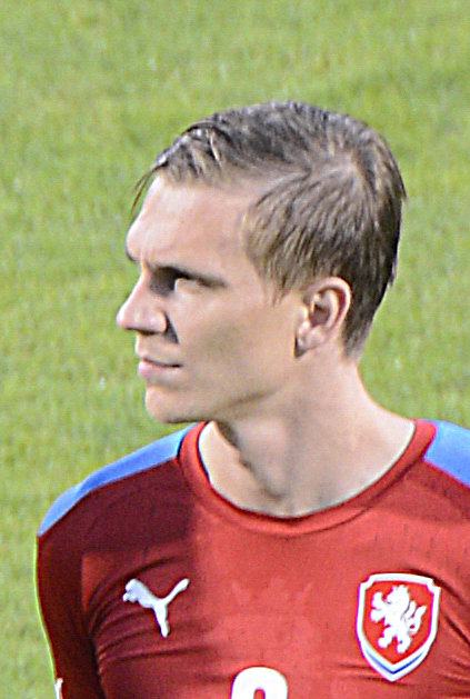 Mezinárodní fotbalový zápas Česko - Rakousko v Olomouce